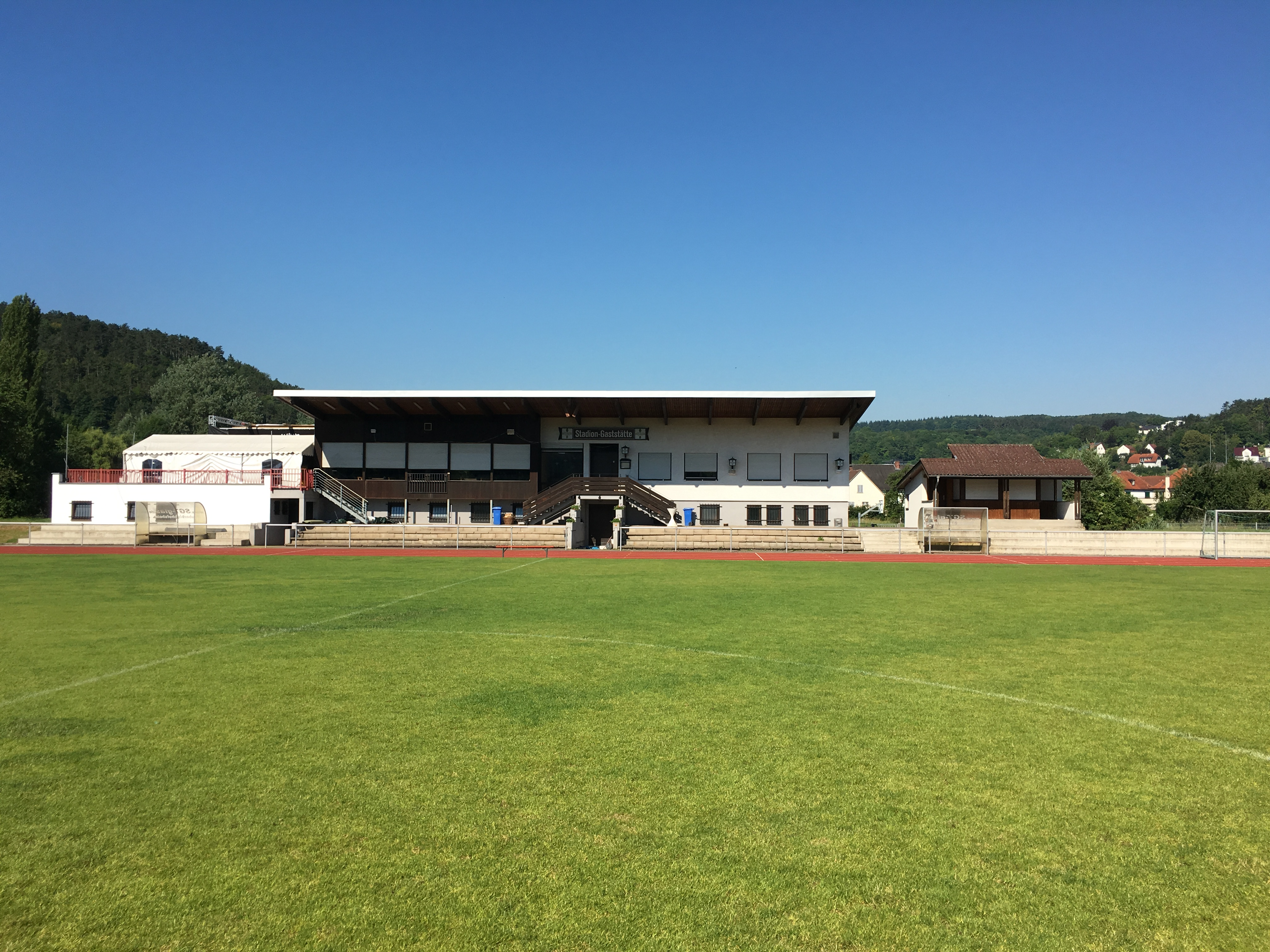 Sportheim - Ansicht Platz Gegengerade